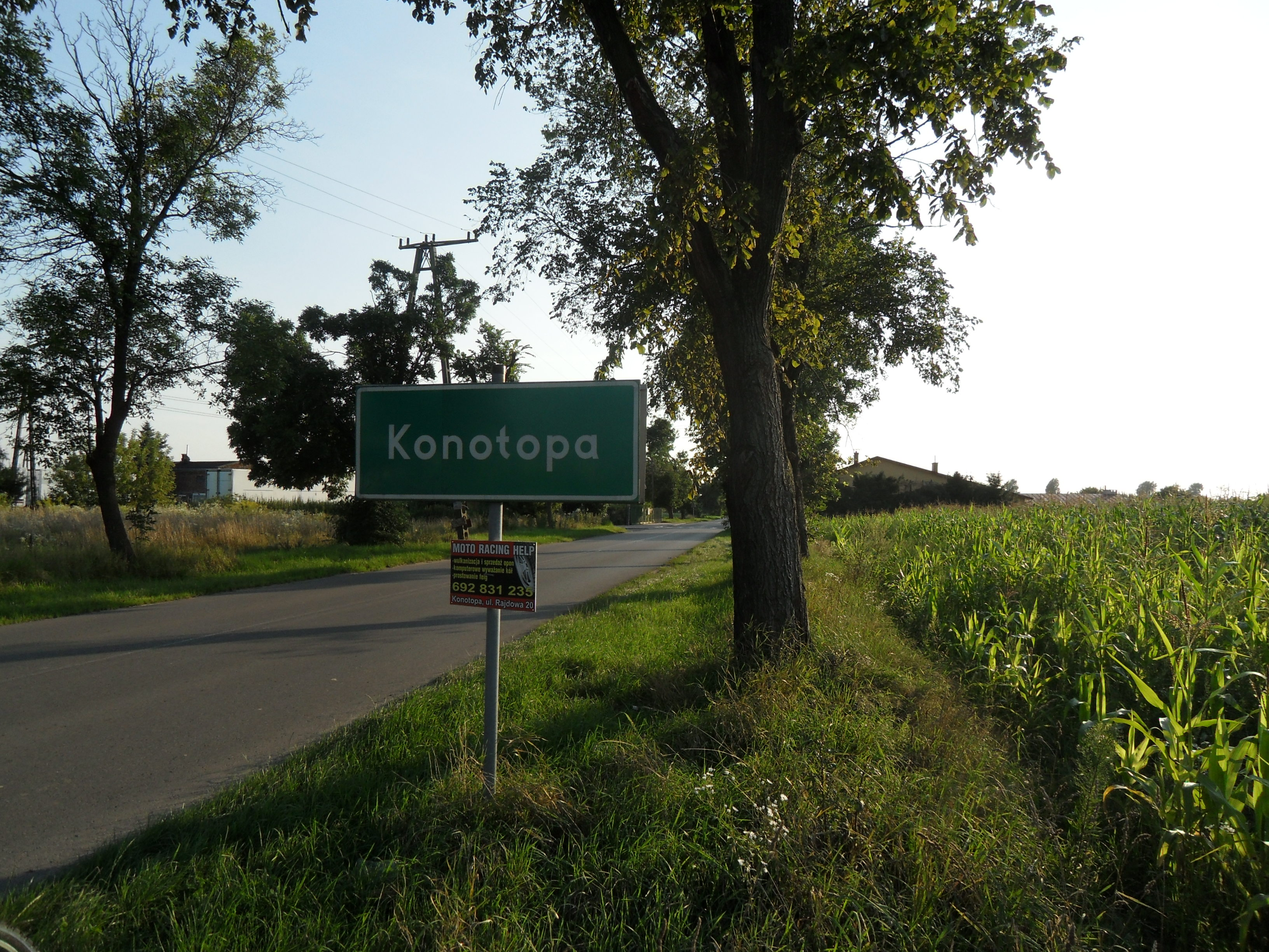 Konotopa, wjazd od strony Jawczyc